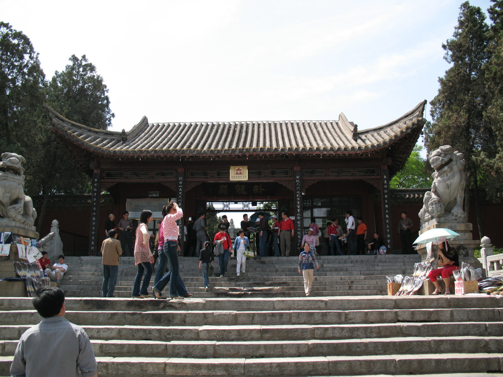 Nanyang Memorial Temple to Wuhou 河南南阳武侯祠